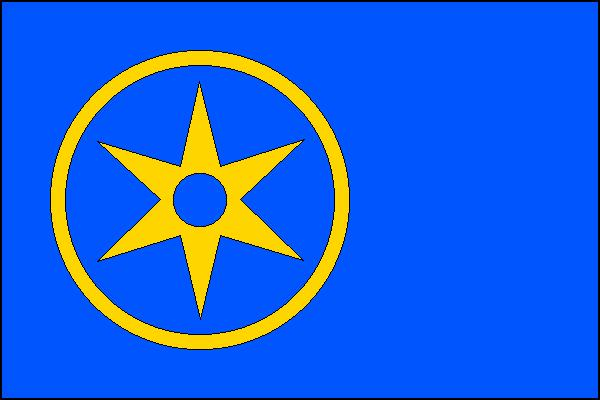 Vlajka obce Zichovec